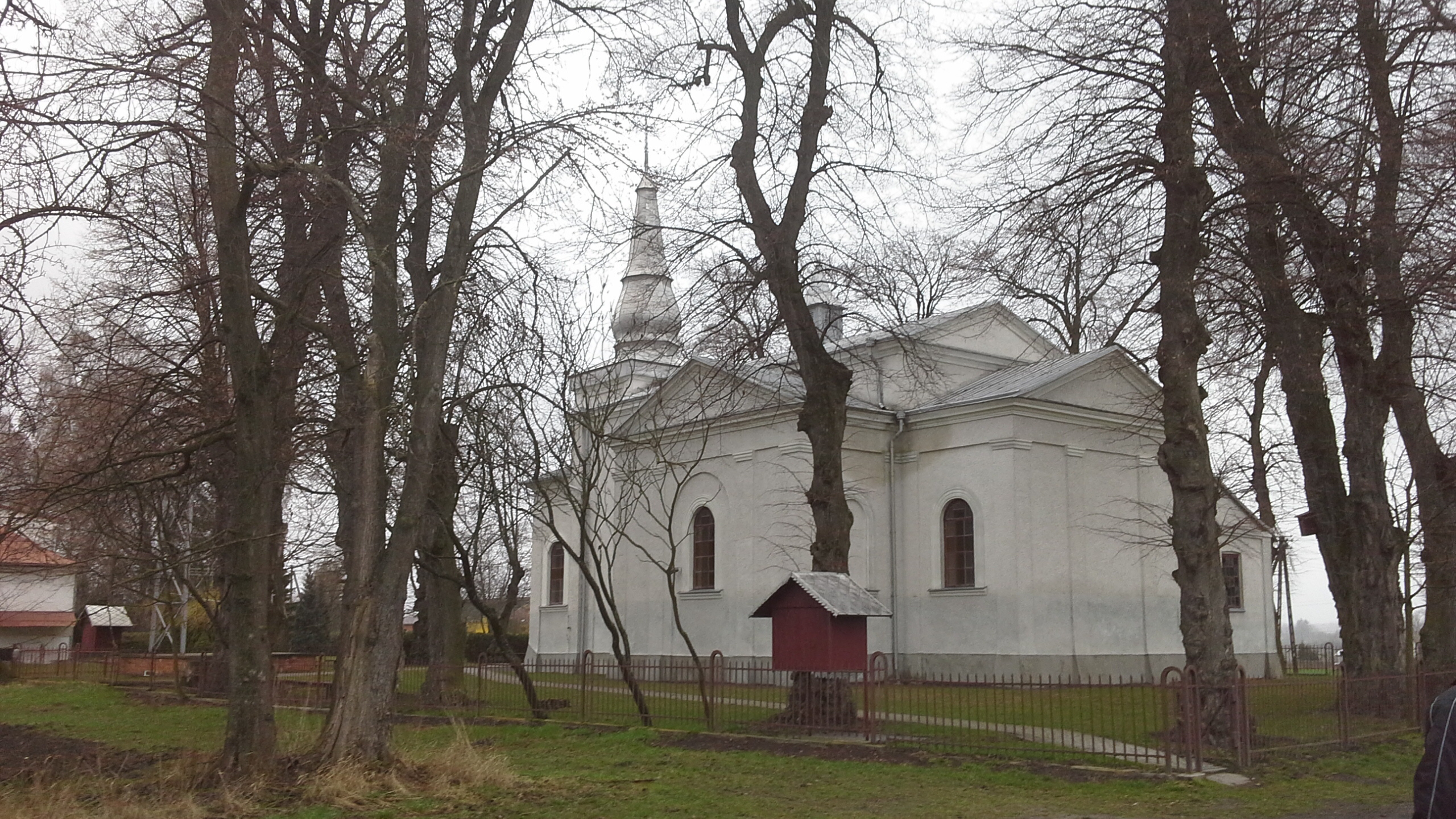 Kościół w Sahryniu